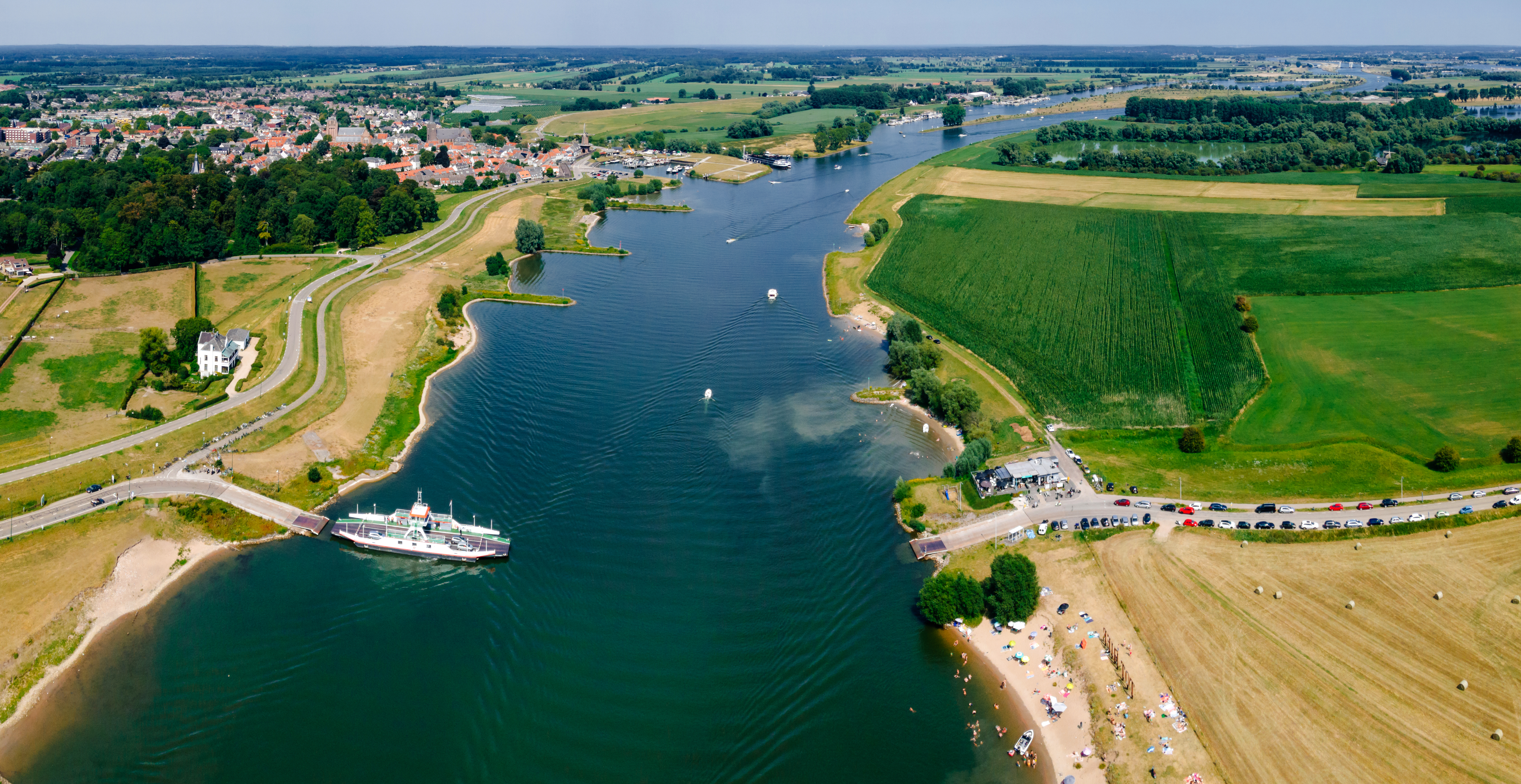 De Lek bij Wijk bij Duurstede. In de voorgrond het Wijkse Veer. Deze foto is gemaakt in de zomer van 2020.